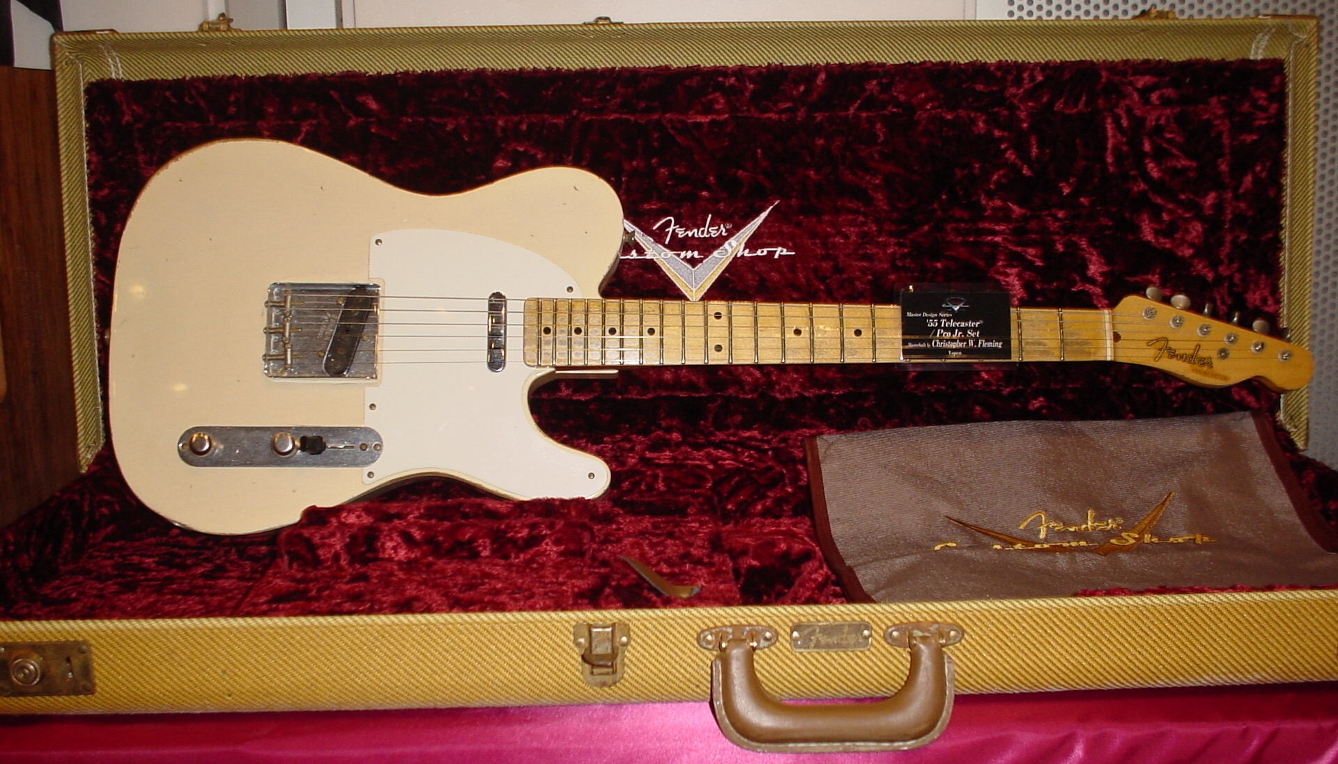 Fender '55 Telecaster/Pro Jr.Set